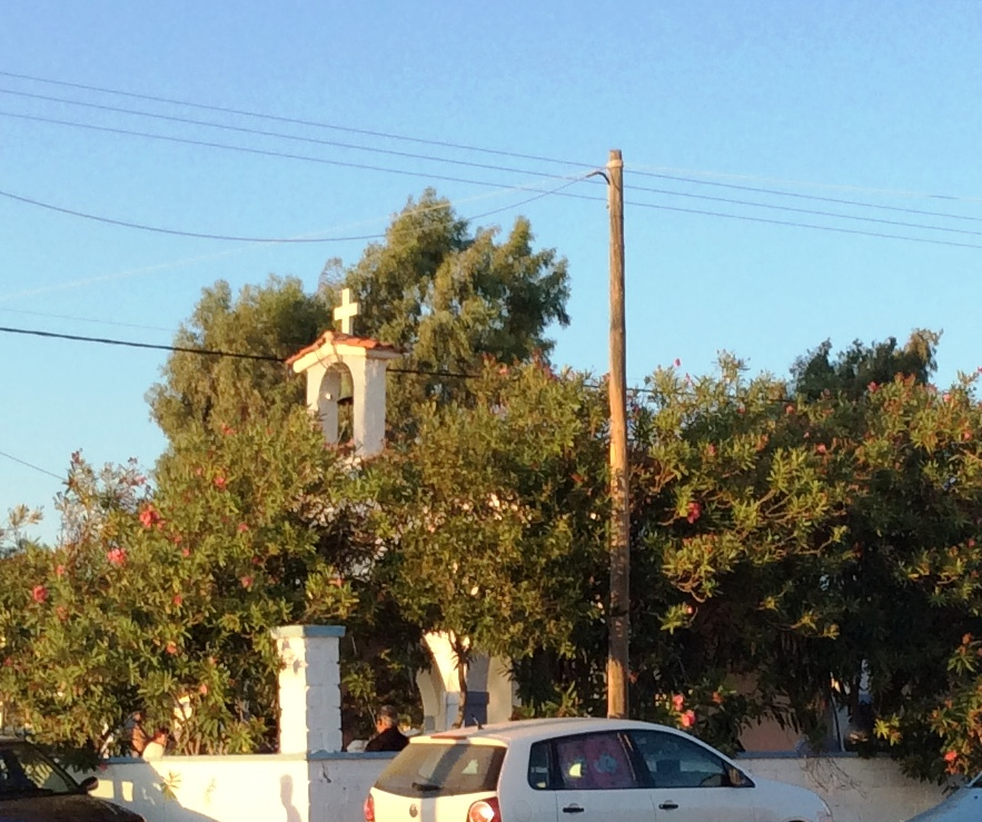 Βρομονέρι Μεσσηνίας. Ο Ιερός Ναός του Αγίου Φανουρίου στο Βρομονέρι.